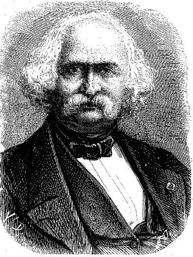 Auguste Perdonnet (1808-1867)